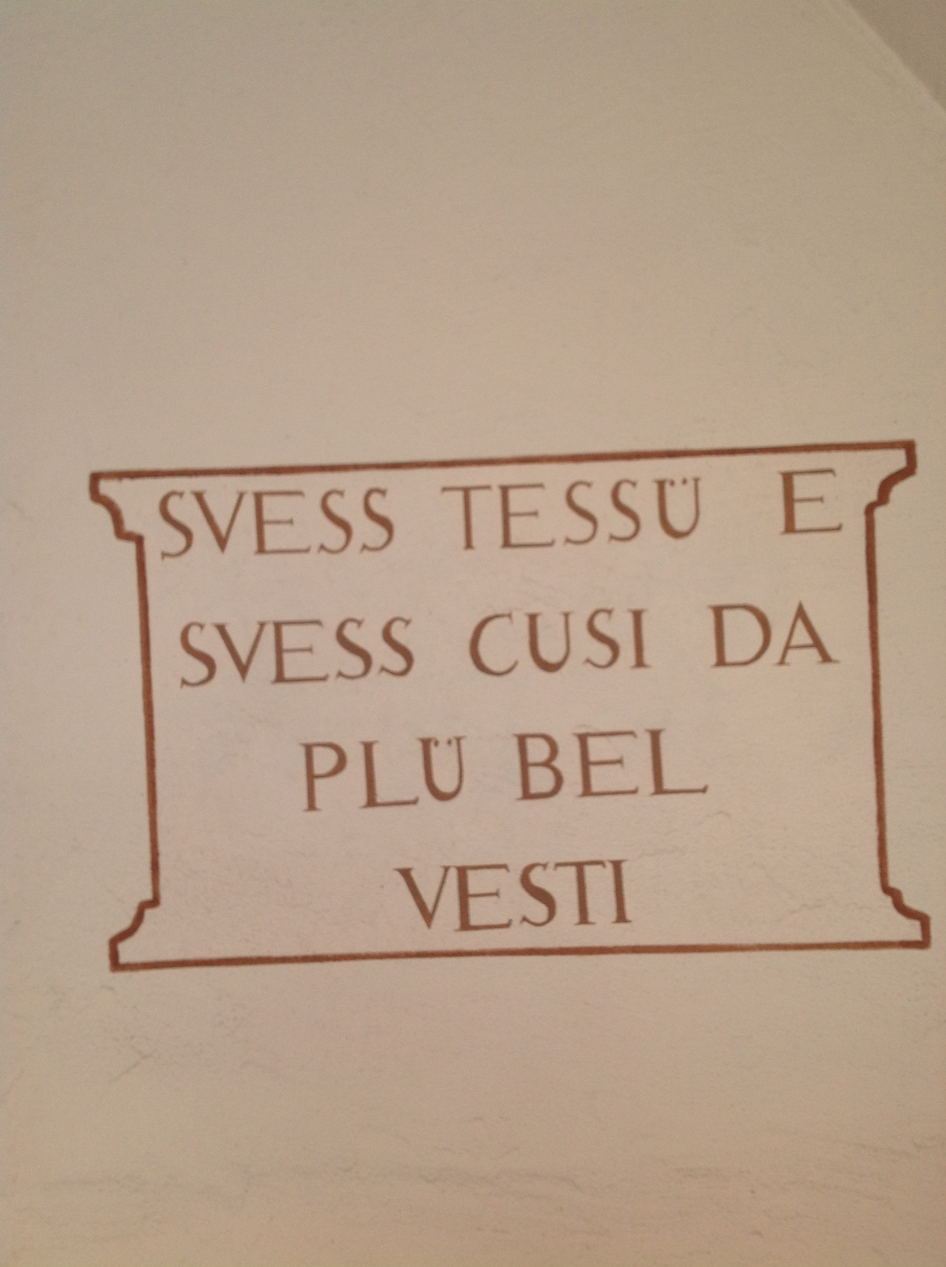 rätoromanischer Sinnspruch am Eingang der Tessanda in Santa Maria Val Müstair